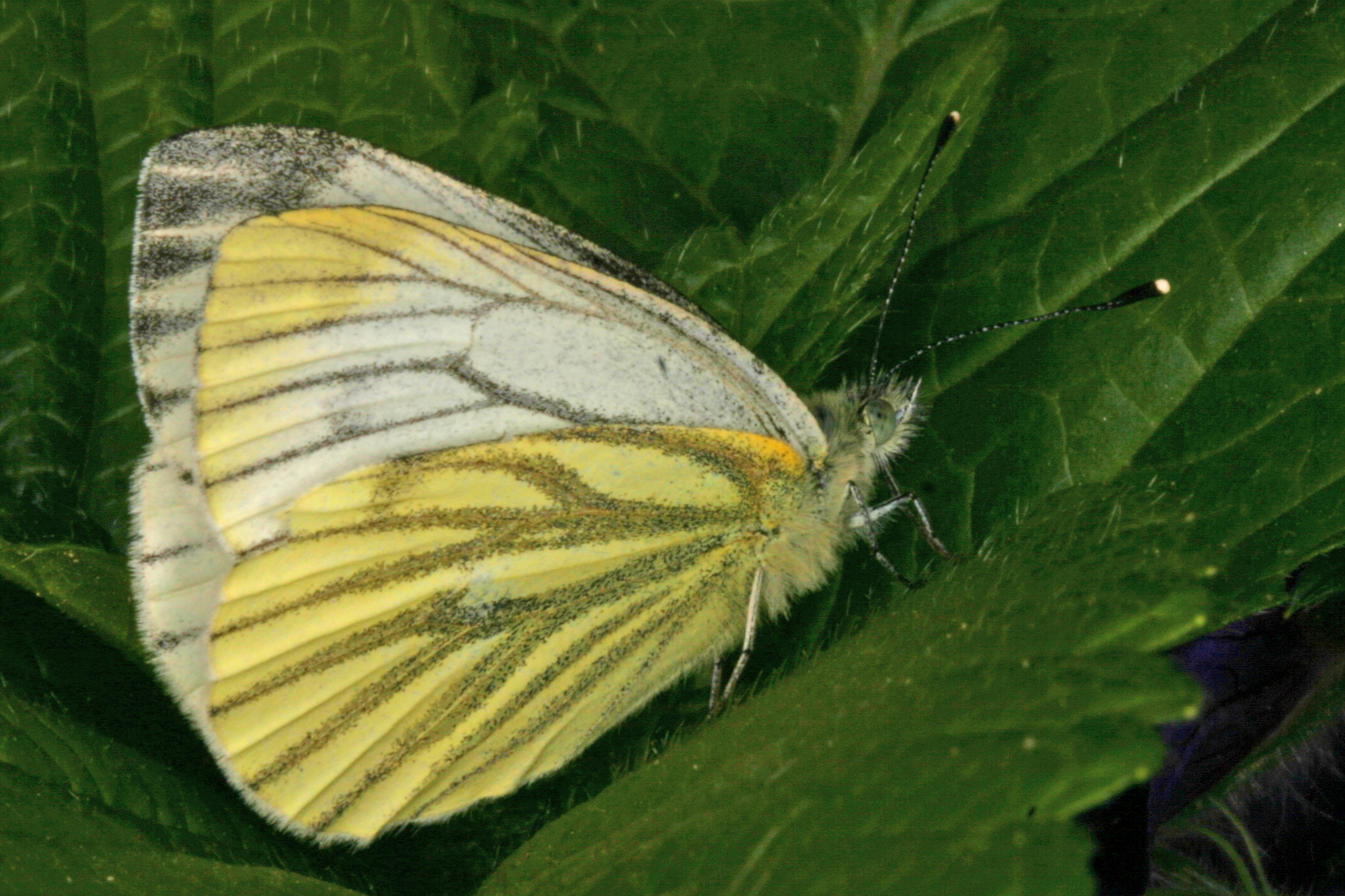 Rapsweißling bei uns auf Campingplatz fotografiert